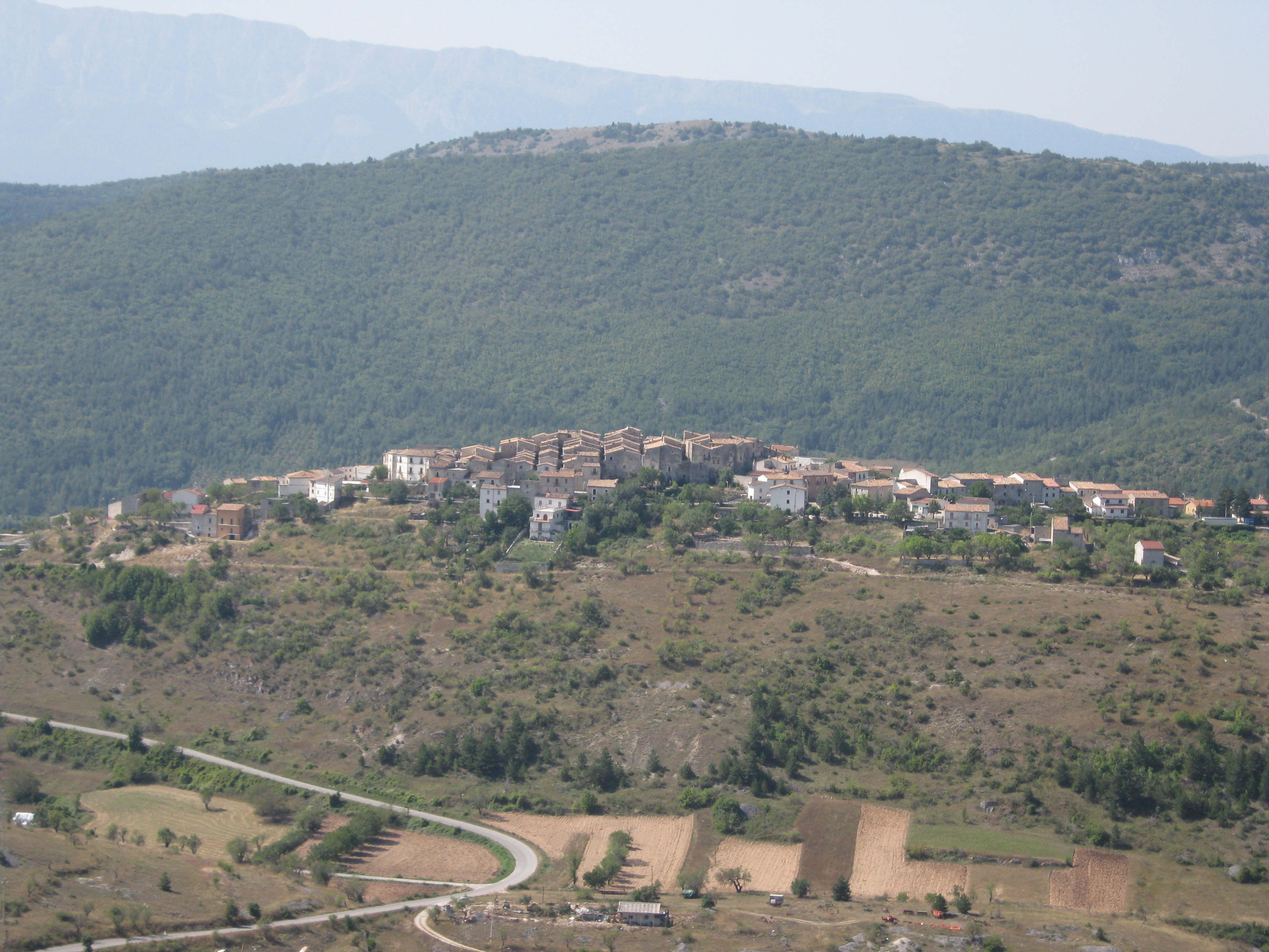 Panorama di Castelvecchio Calvisio (L'Aquila)